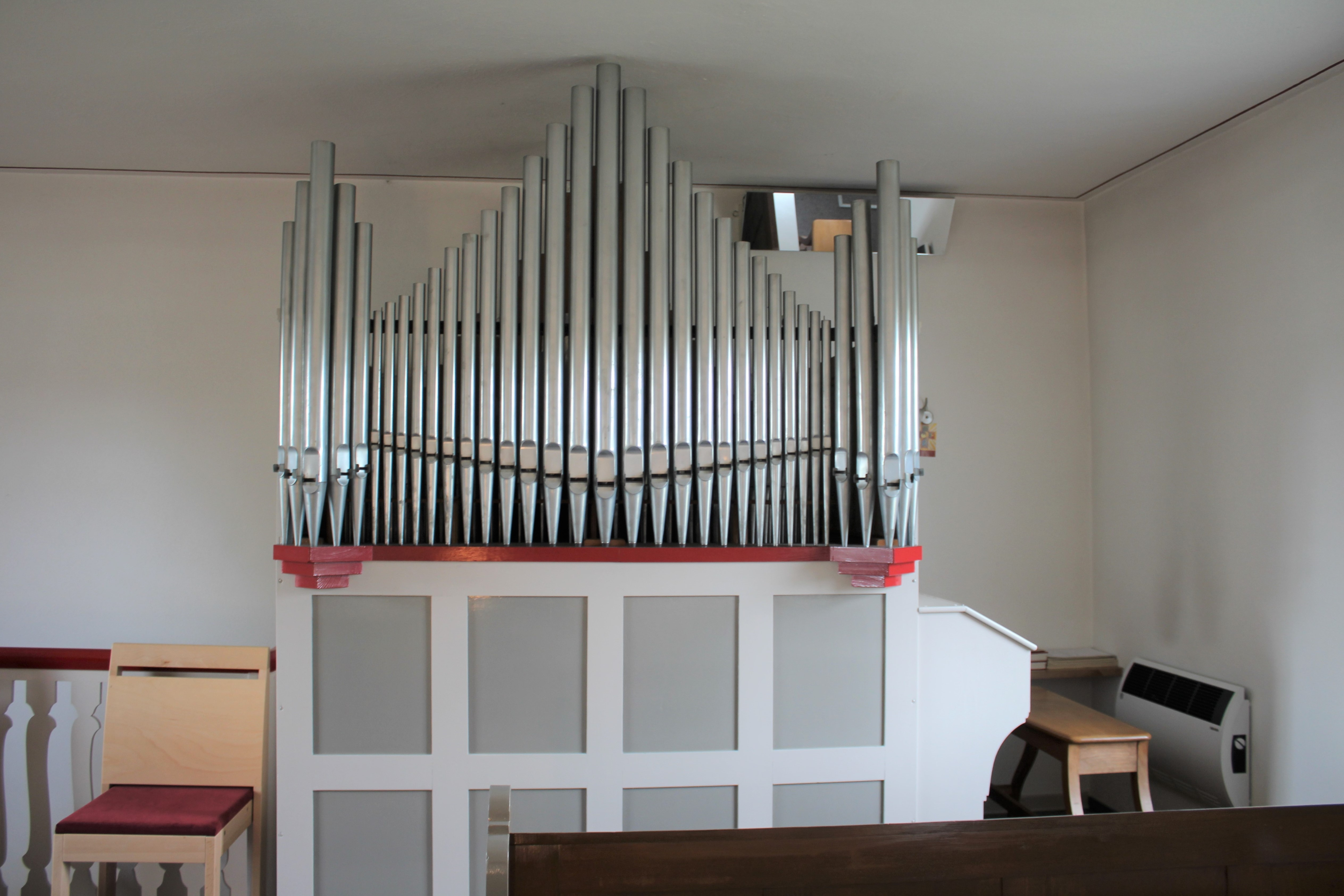 Evangelische Kirche Neukirchen, Braunfels, Lahn-Dill-Kreis, Hessen, Deutschland